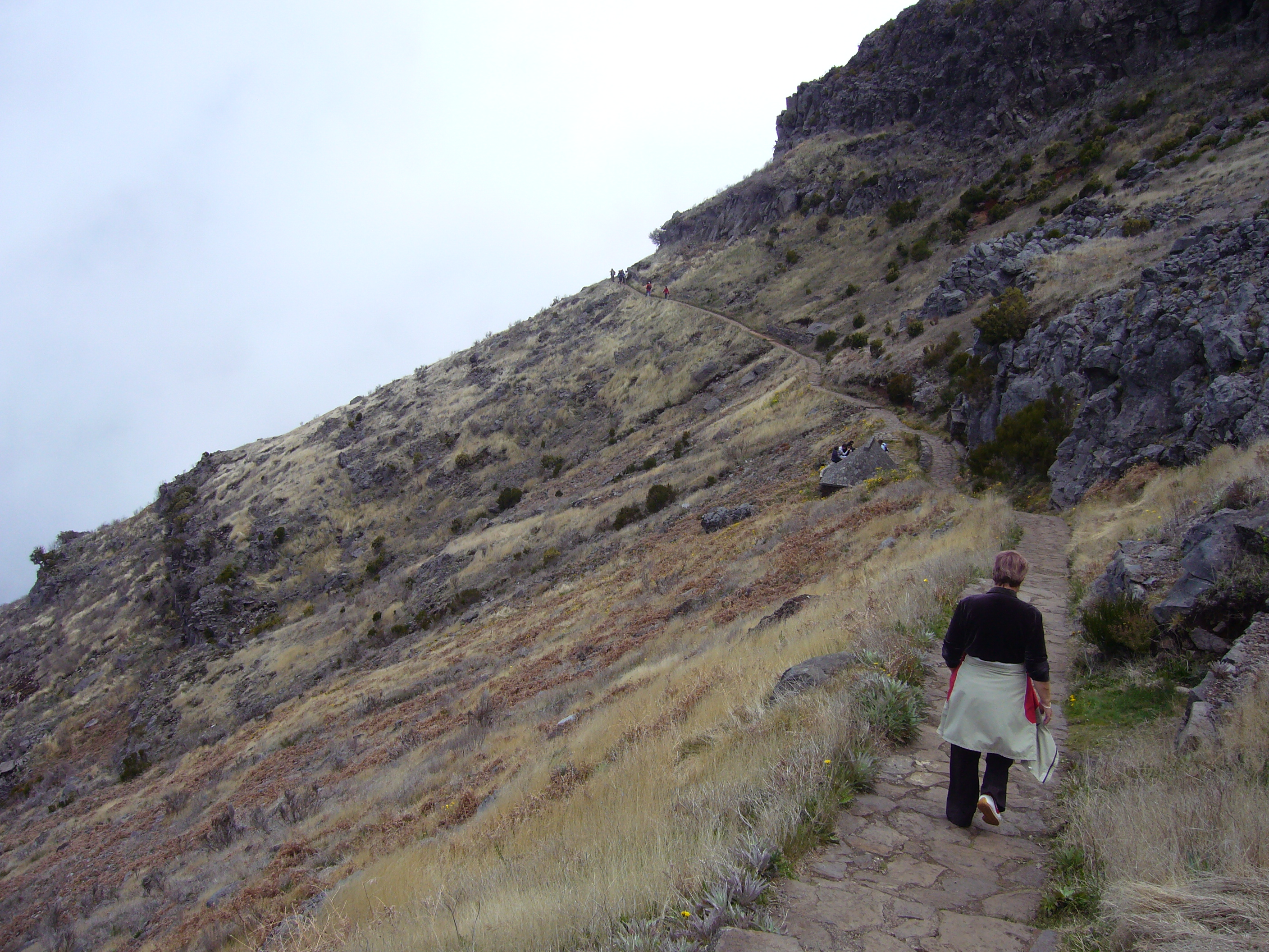 Dlážděný chodník mezi Achada do Texeira a Pico ruivo nad Santanou.